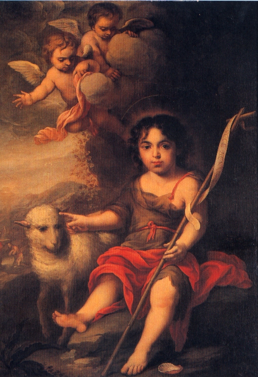 La obra representa al profeta San Juan Bautista, precursor del Mesías.